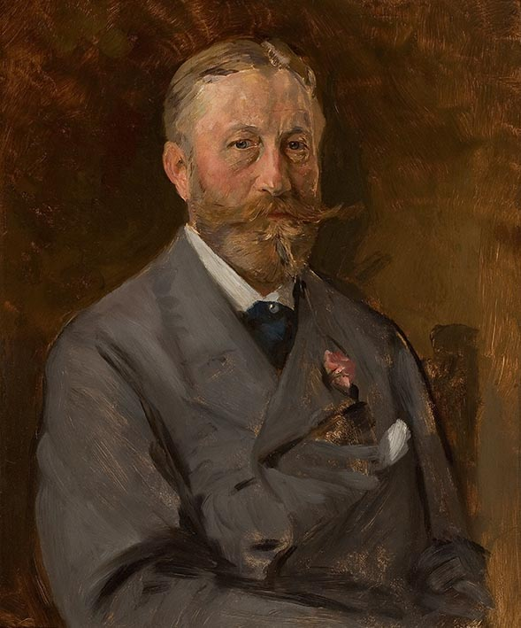 Fondateur galerie Brame